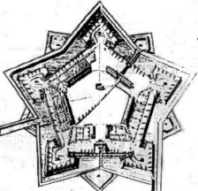 Immagine della fortificazione della Cittadella di Torino (anti stampa in PD) - già presente attraverso en.wiki